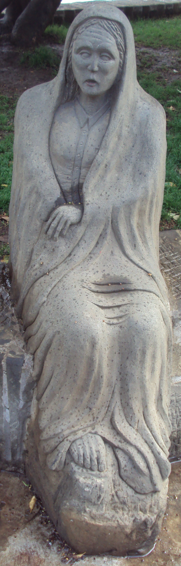 Estatua de la Viuda, plaza de Ancud, Chile.